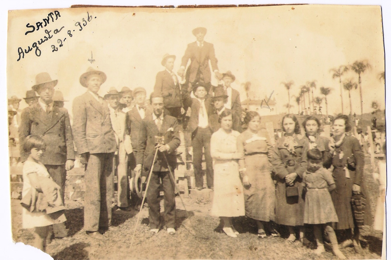 Festa na Capela Santa Augusta, Braço do Norte/SC, 22 de agosto de 1936. Fotografia cedida por Estela Maria Kindermann Bianchini. Acervo da família